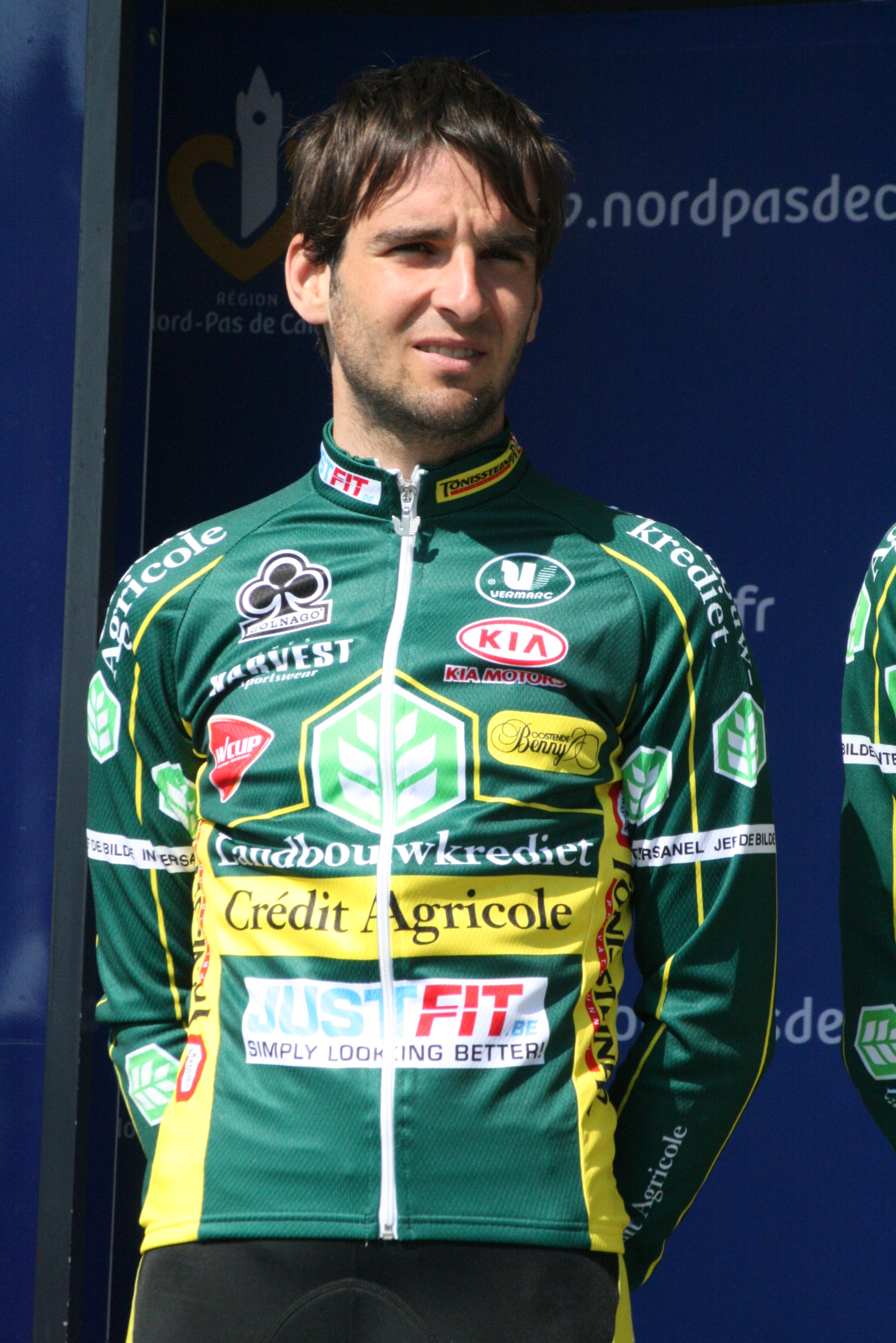 Présentation des coureurs au départ de la première étape Baptiste Planckaert